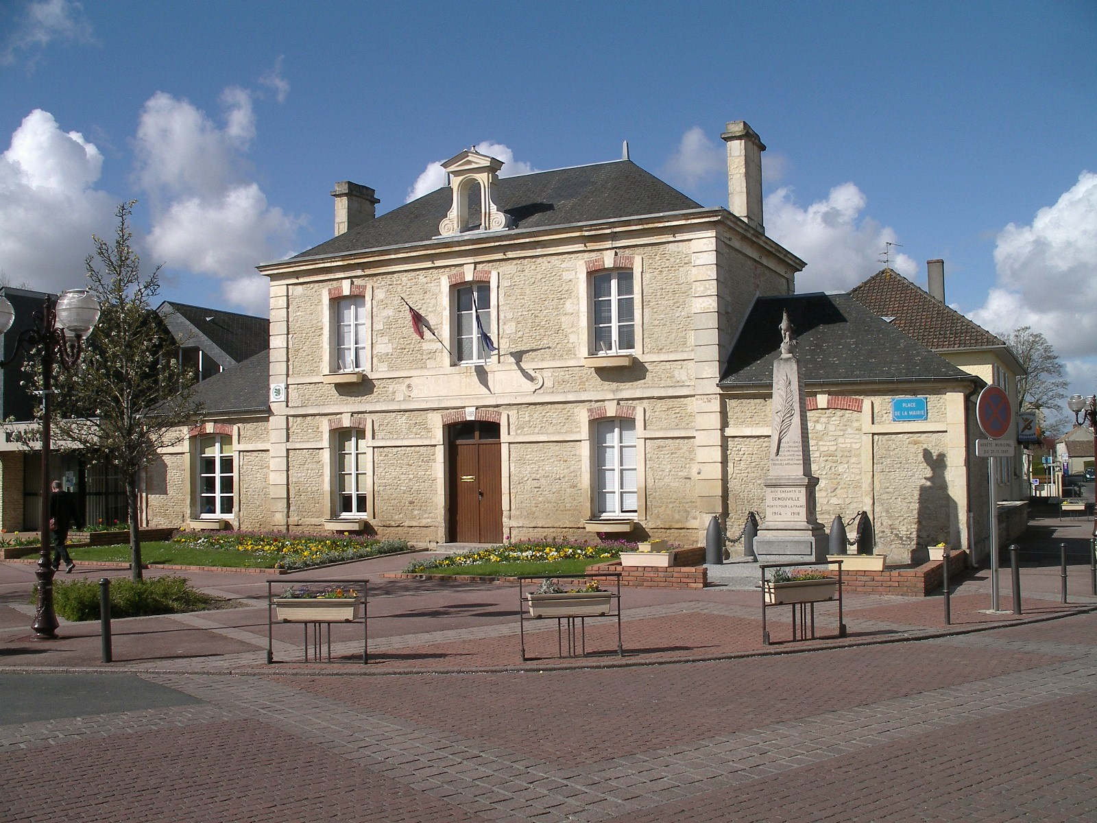 Mairie de Démouville (Calvados)